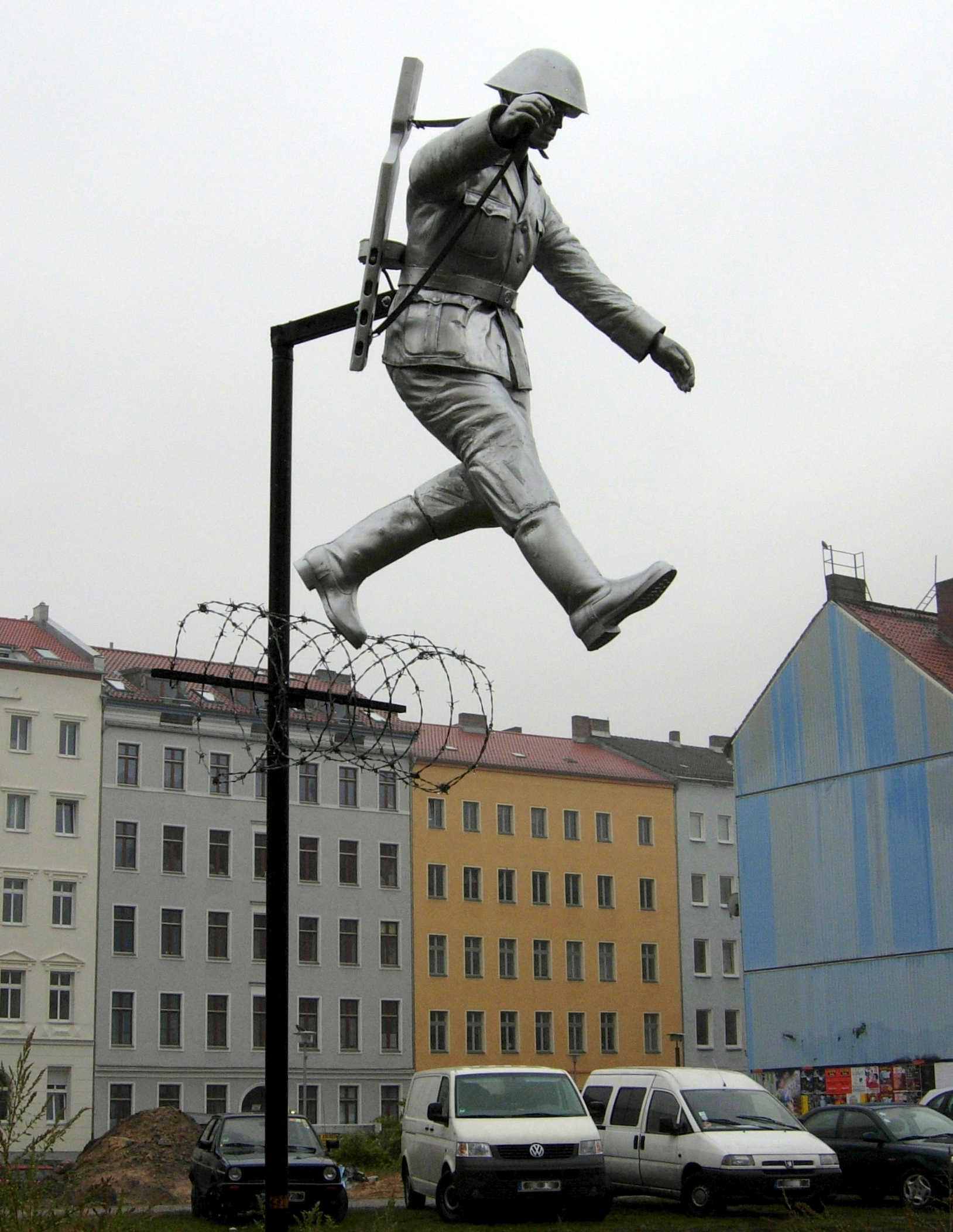 Skulptur auf dem Mauerstreifen an der Bernauer Straße (Nähe Ruppiner Straße) in Berlin-Mitte; sie erinnert an den NVA-Soldaten Conrad Schumann, der am 15. August 1961 (zwei Tage nach der Grenzabriegelung) aus der südlichen Ruppiner Straße über einen Stacheldrahtverhau in die Bernauer Straße sprang (vom sowjetischen Sektor in den französischen); die Häuser im Hintergrund zieren die Titelseite des Berlin-Romans Mauerstreifen (Jesinghaus, Verlag Universal Frame)